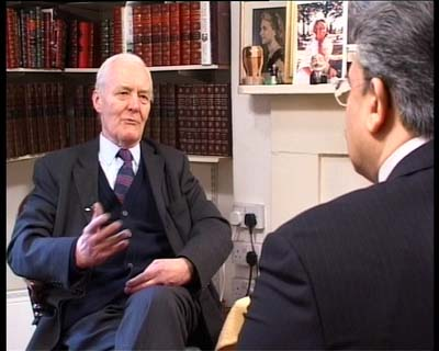 تونی بن